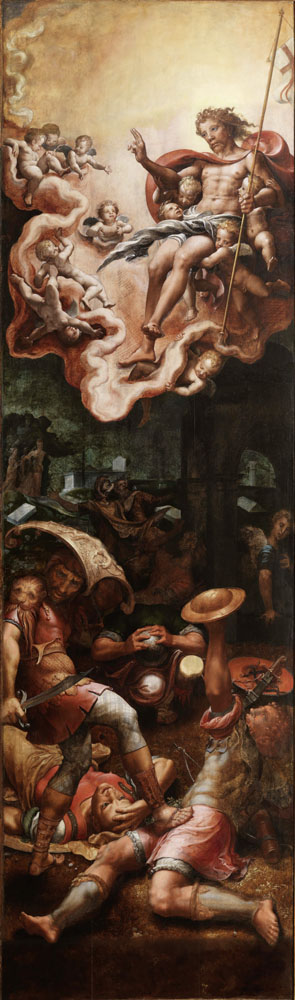 Cristo Ressuscitado, painel direito do Tríptico da Descida da Cruz (1540-5) de Pieter Coeck van Alest no Museu Nacional de Arte Antiga, Lisboa, Portugal.